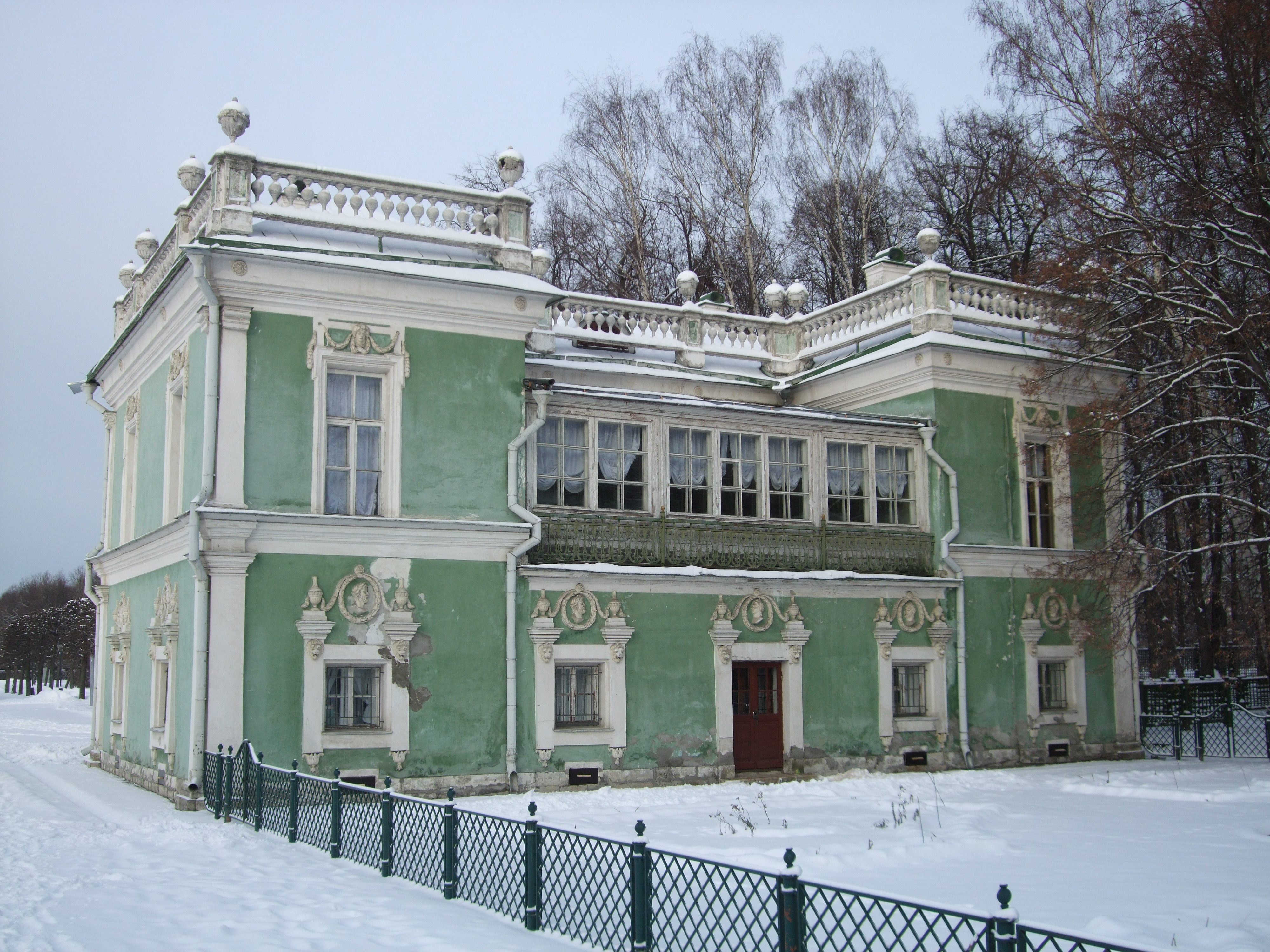 Россия, город Москва, усадьба Кусково. Павильон "Итальянский домик", задний фасад